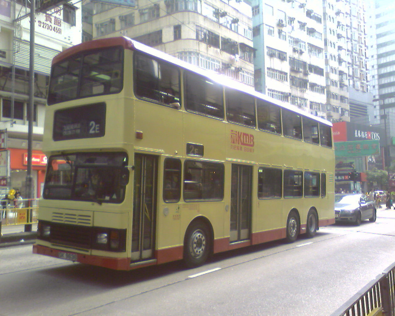 中文（香港）: 九龍巴士2E線的非空調巴士，攝於佐敦道。